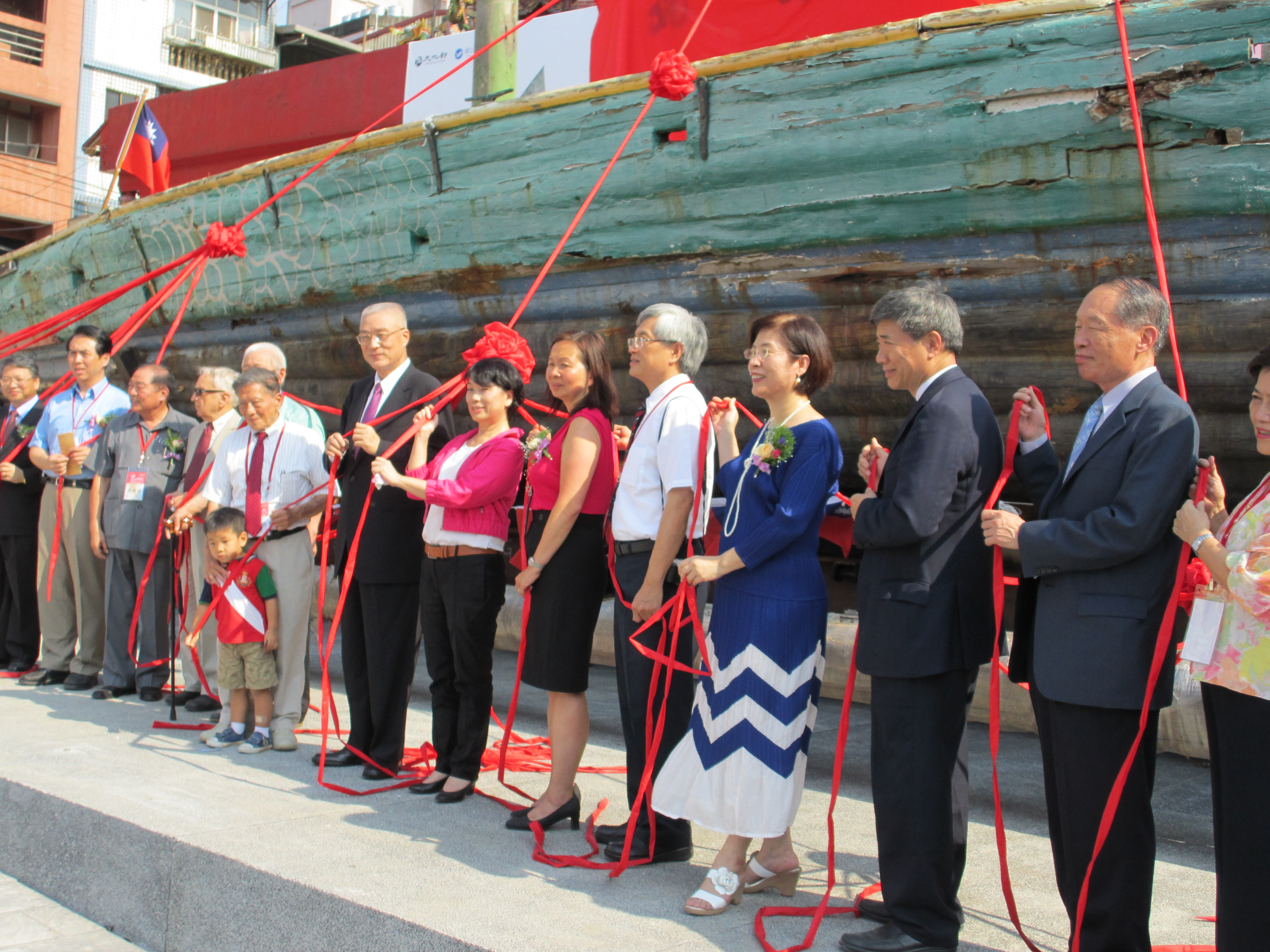 中文（台灣）: 中華民國文化部文化資產局等舉辦自由中國號木船回台典禮。